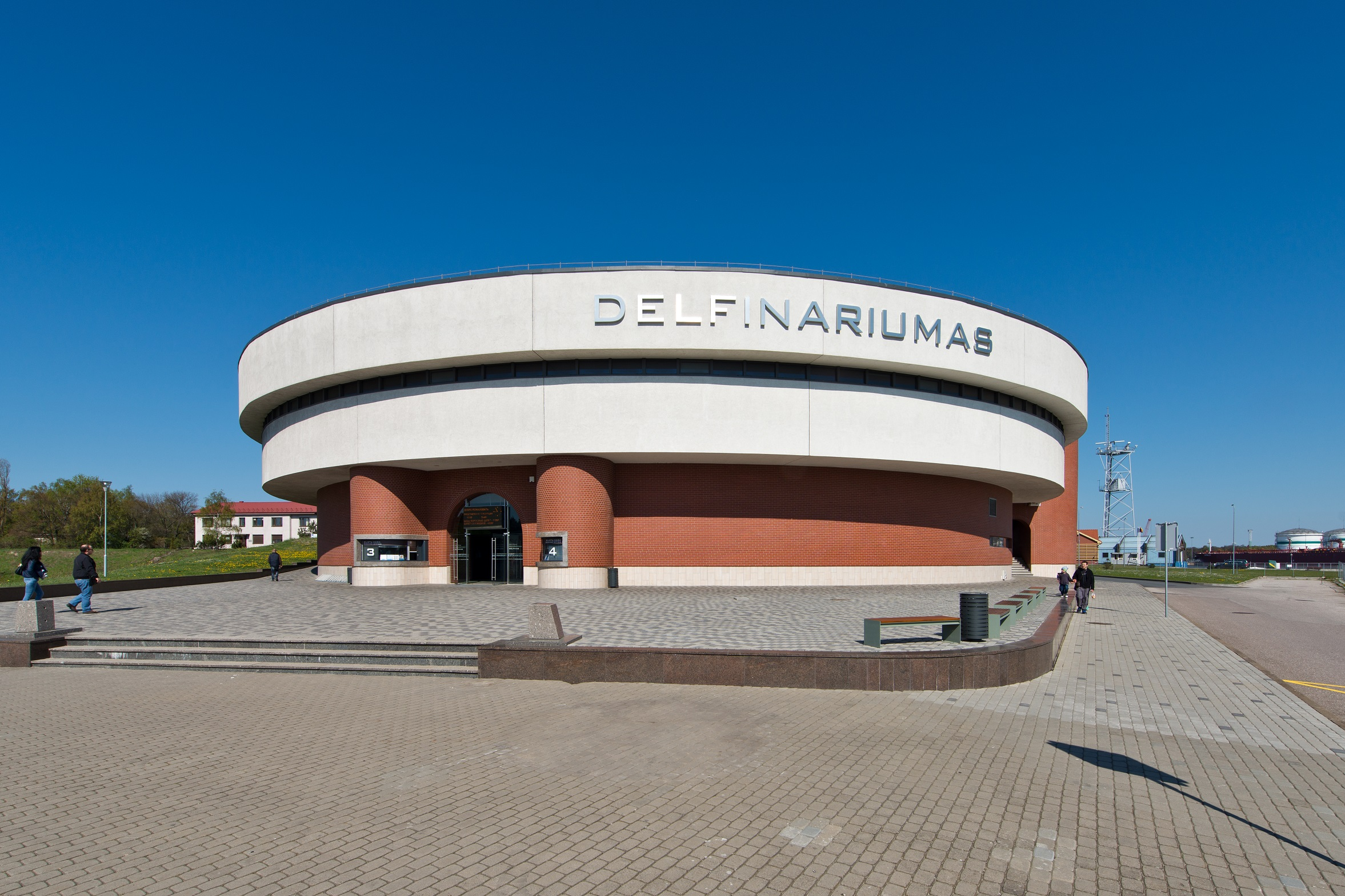 Fotografas: Leonas Garbačauskas